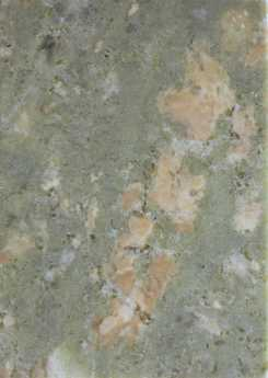 Kolmårdsmarmor (Schweden)